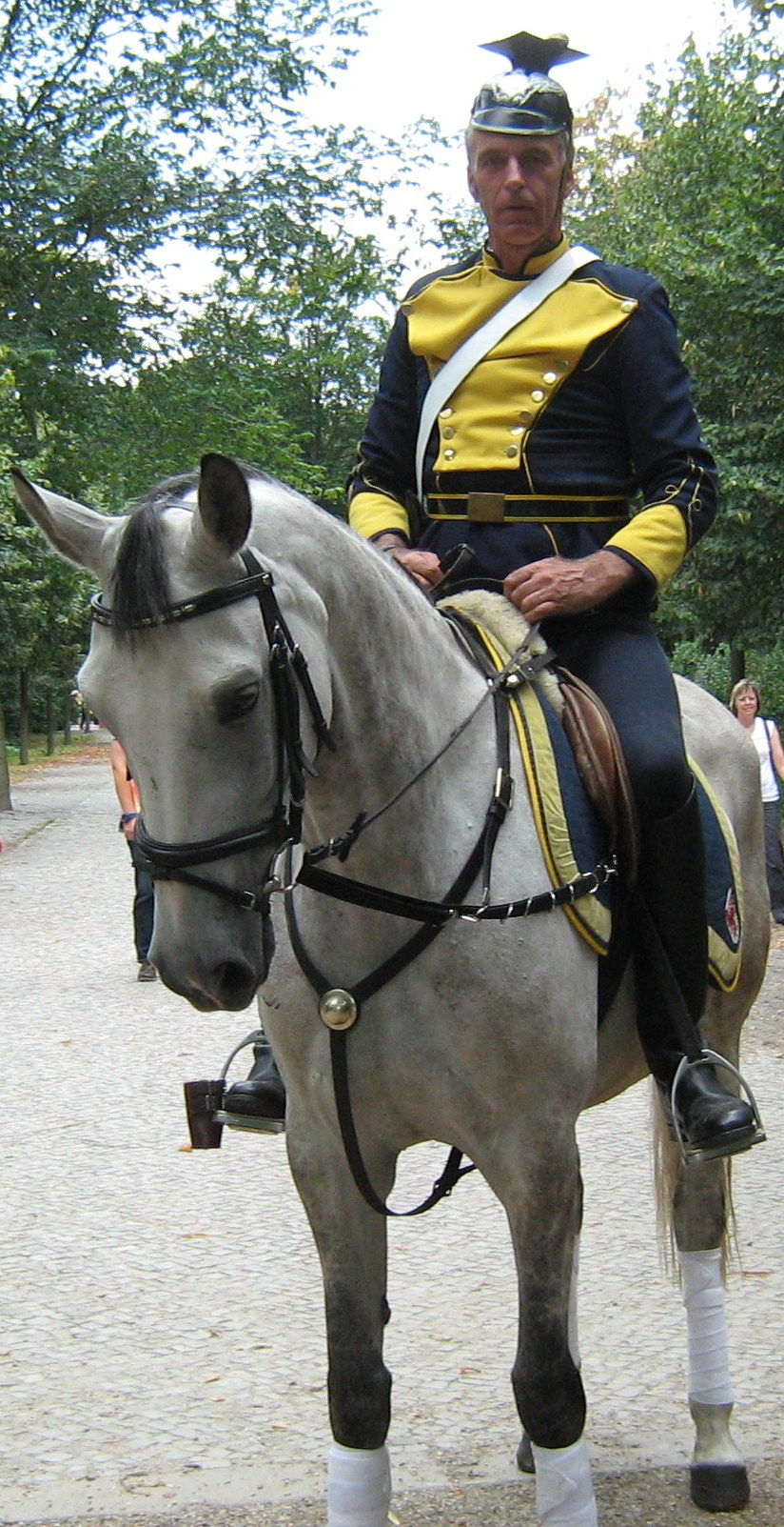 Kaiserliche Zeit (Historie in Berlin 2009)